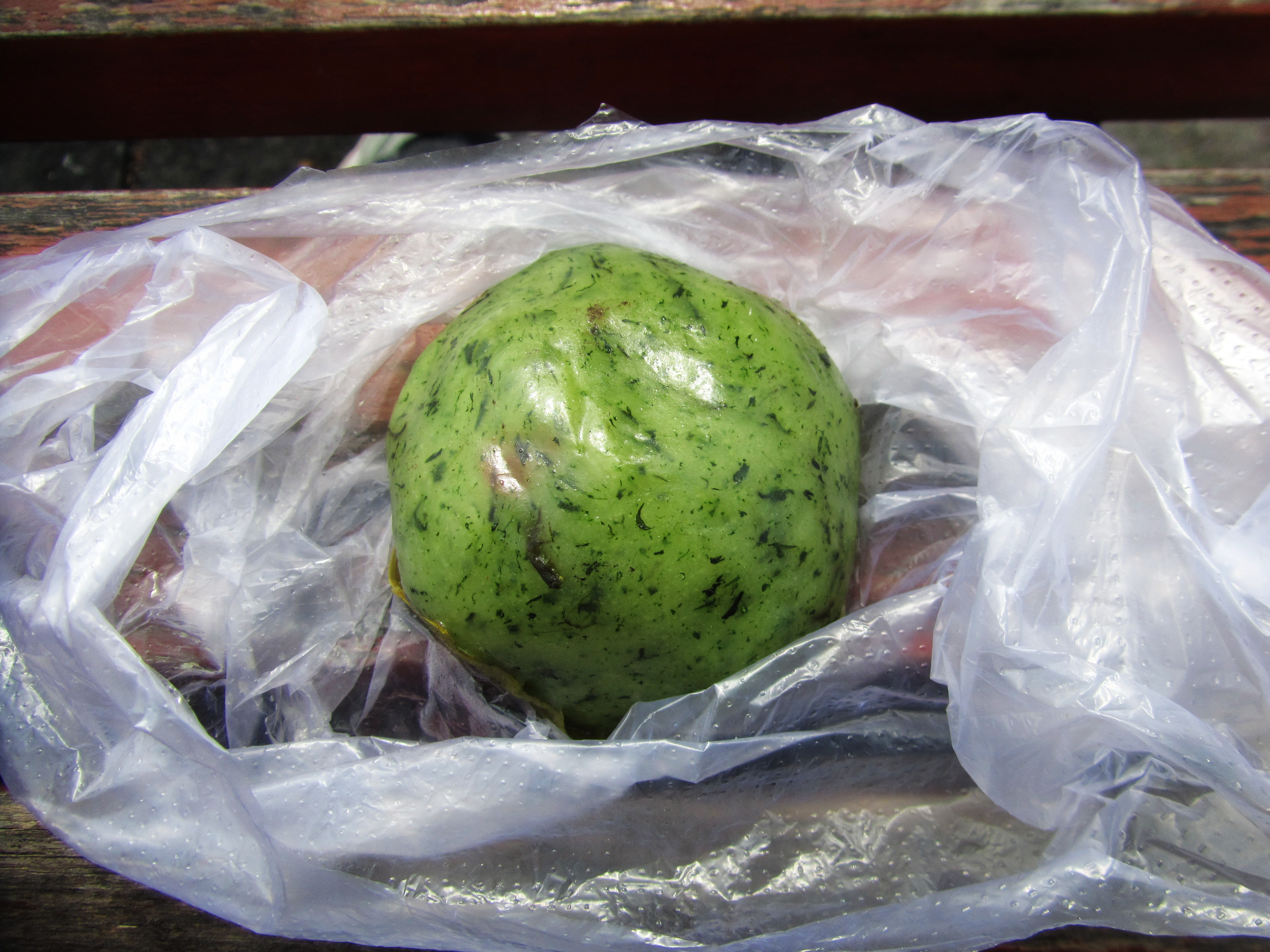 蒸熟的新鲜青团，摄于杭州余杭区塘栖镇。